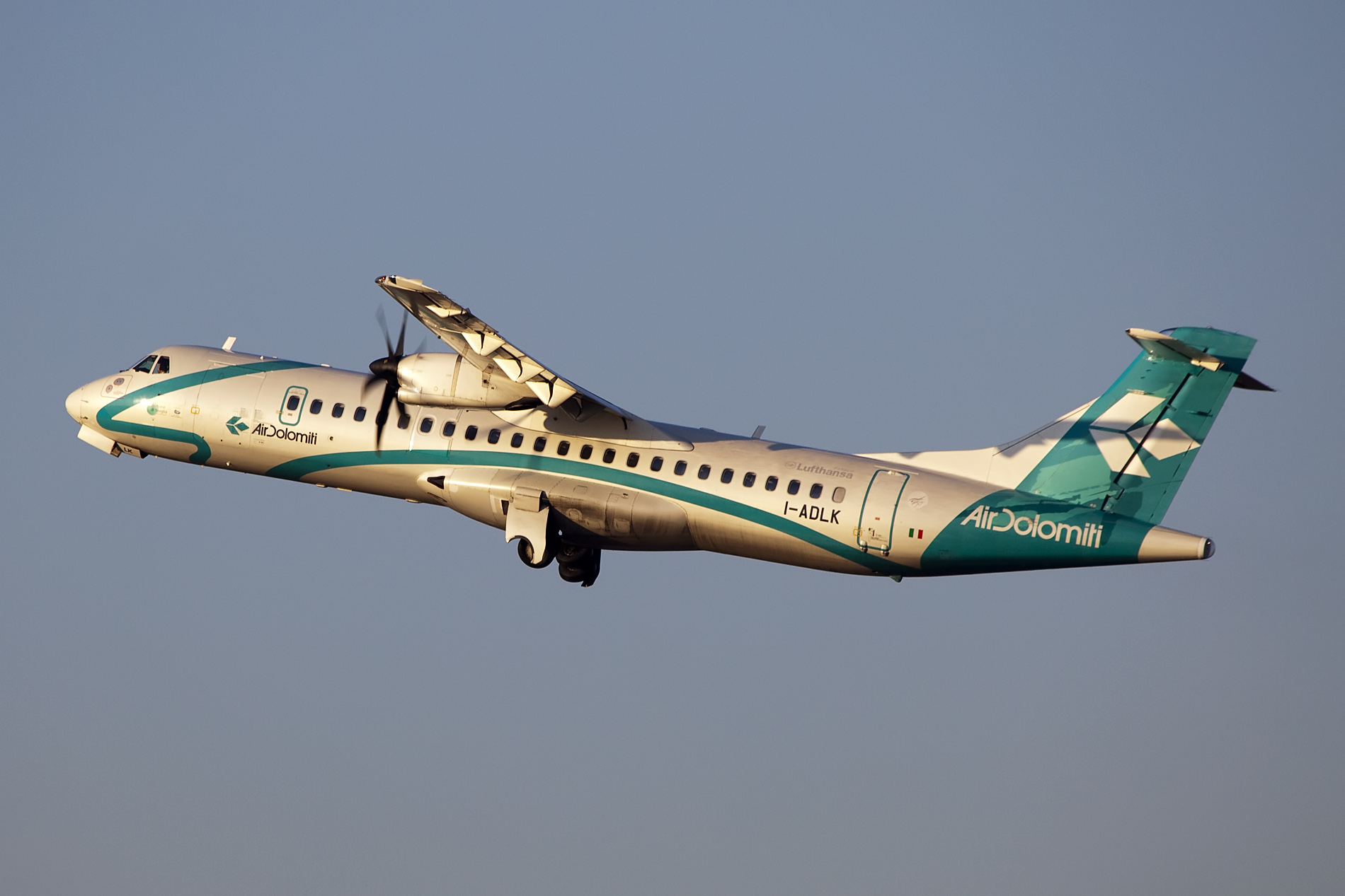 Frankfurt